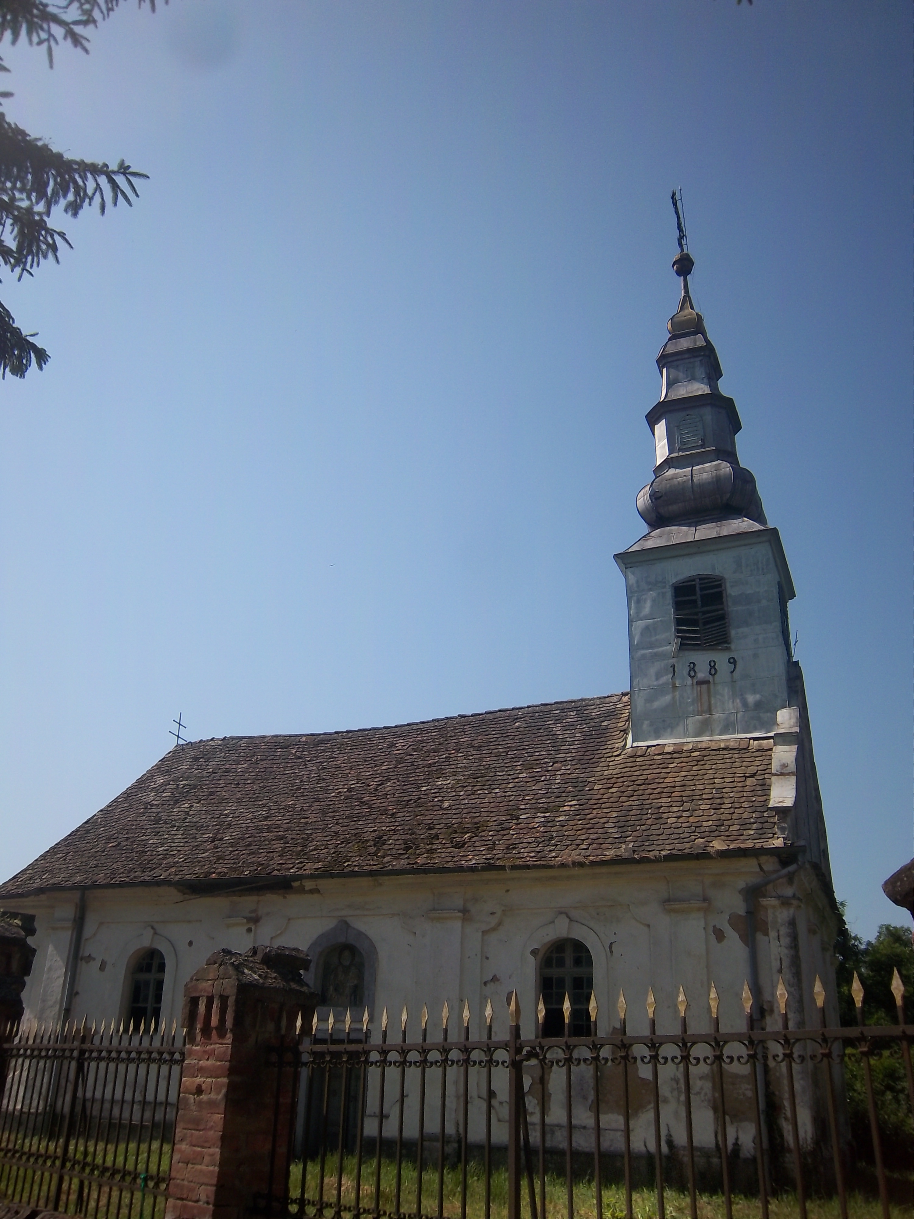 Српски (ћирилица): Српска православна црква у селу Миклушевци у источној Славонији (Општина Томпојевци, Република Хрватска).